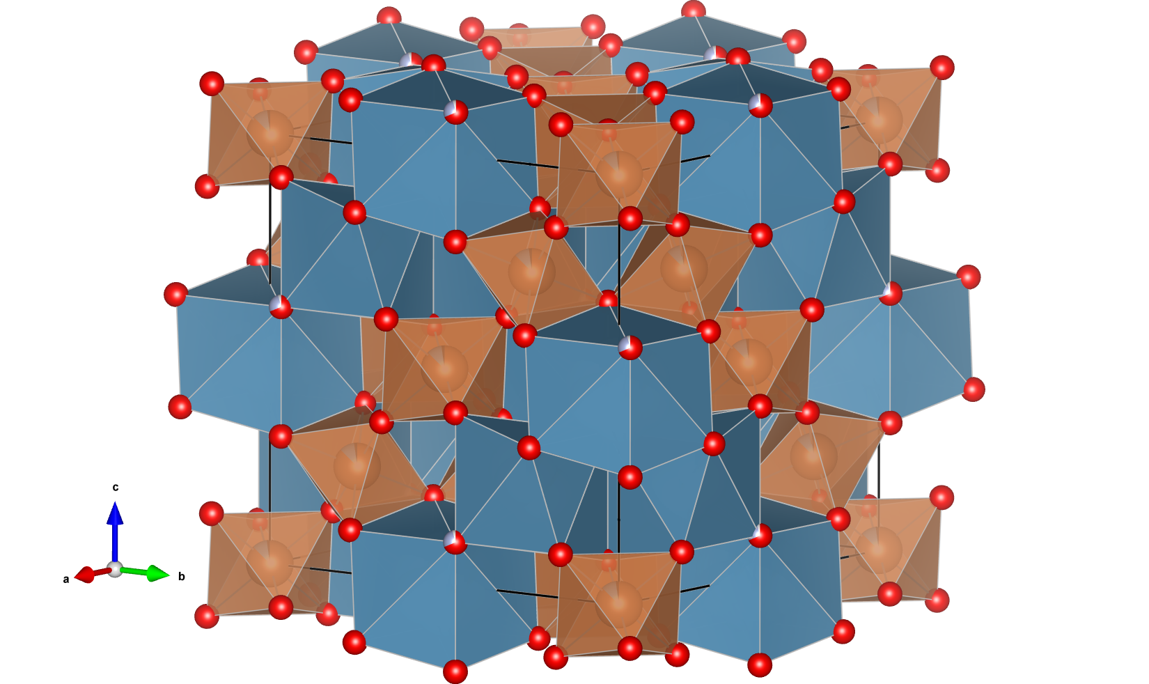 Kristallstuktur von Oxycalcioroméit als „Polyeder-Modell“. Erstellt mithilfe des freien Strukturprogramms VESTA und den CIF-Daten von Cristian Biagioni, Paolo Orlandi, Fabrizio Nestola und Sara Bianchin. Farblegende: BO6-Oktaeder: braun; AO8-Polyeder: graublau; Sauerstoff: rot.